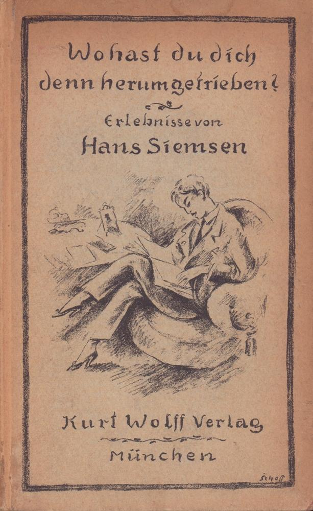 Hans Siemsen - Wo hast du dich denn herumgetrieben ?, Kurt Wolff Verlag, München 1920. Schutzumschlag von Otto Schoff.